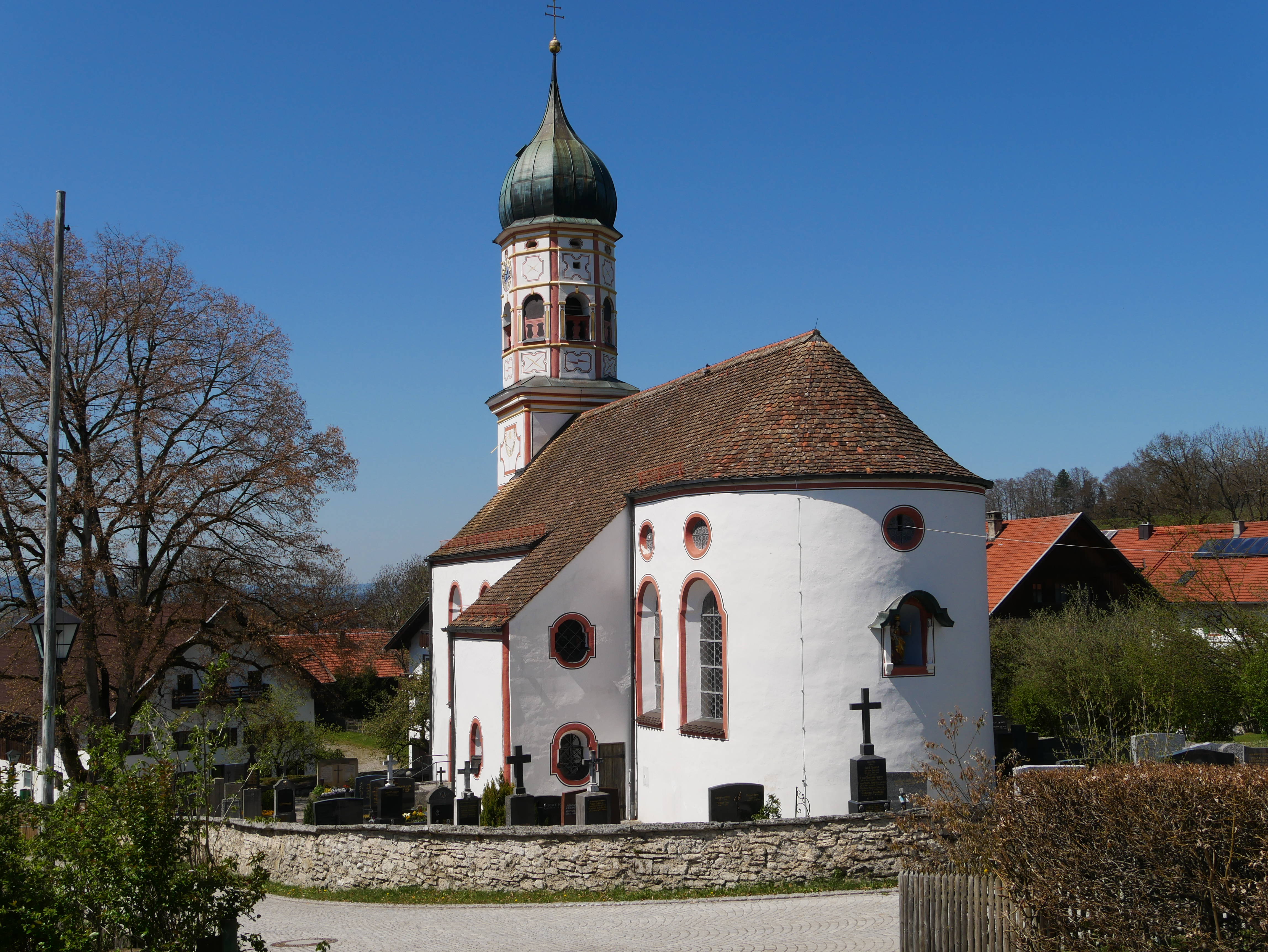 Riegsee-Aidling, Kirchberg 1, Kath. Pfarrkirche St. Georg. Ansicht von OSO